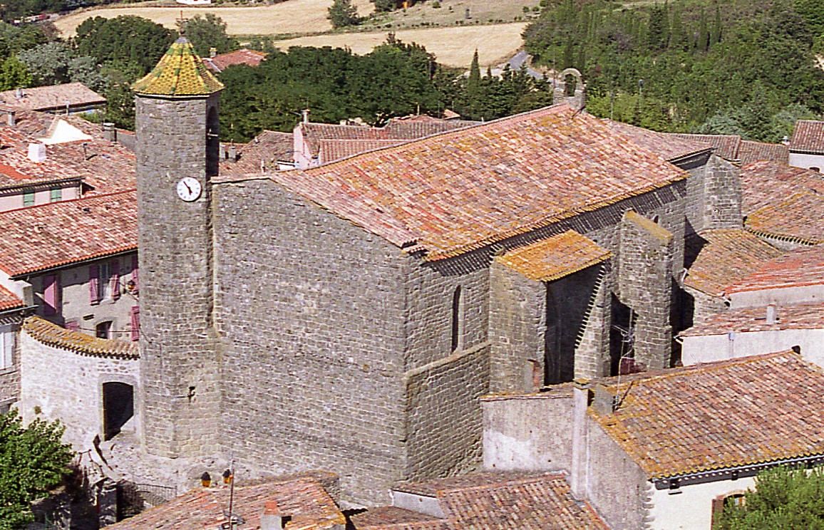 vue aérienne de l'église Saint Germain, au milieu de la circulade